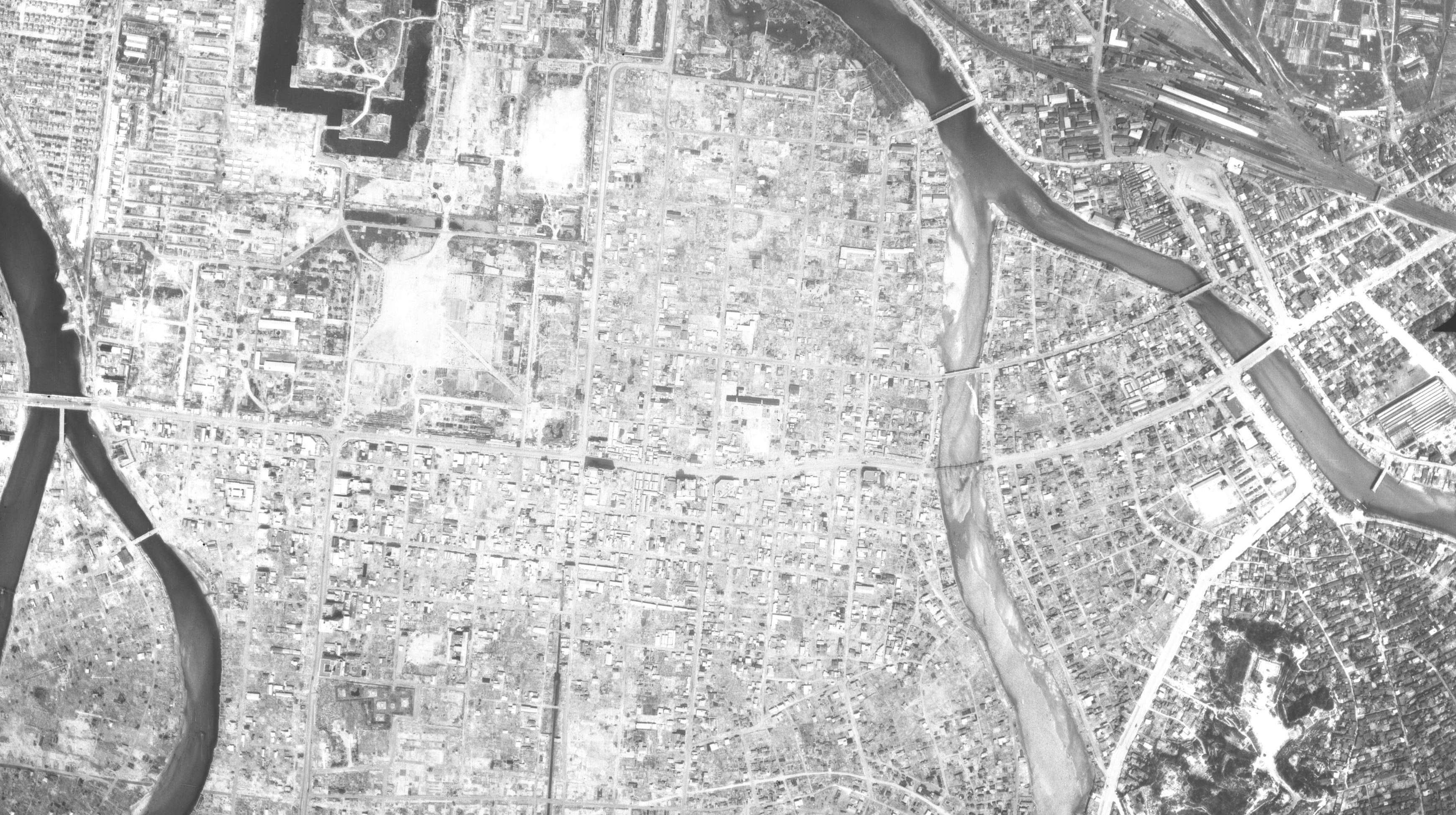 1947年4月広島市相生通り周辺